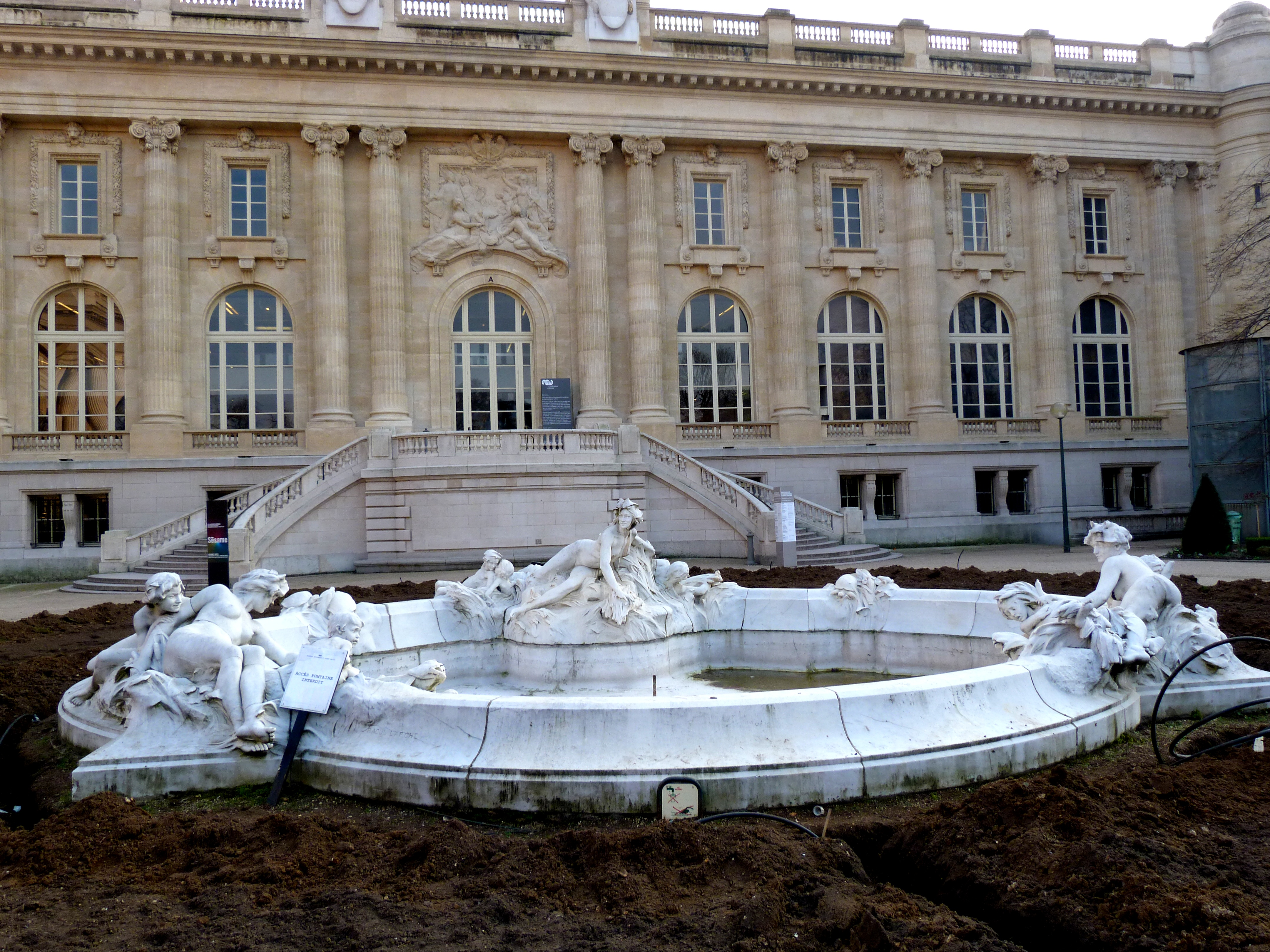 Fontaine Miroir d'eau, la Seine et ses affluents, marbre, 1910, François-Raoul Larche (1860-1912). Destinée à la place du Carrousel, la fontaine est installée dans le square Jean-Perrin, sur le côté du Grand-Palais.